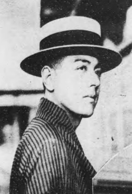 諸口十九 裸にした映画女優 泉沢悟朗 著 (日本映画研究会, 1925)